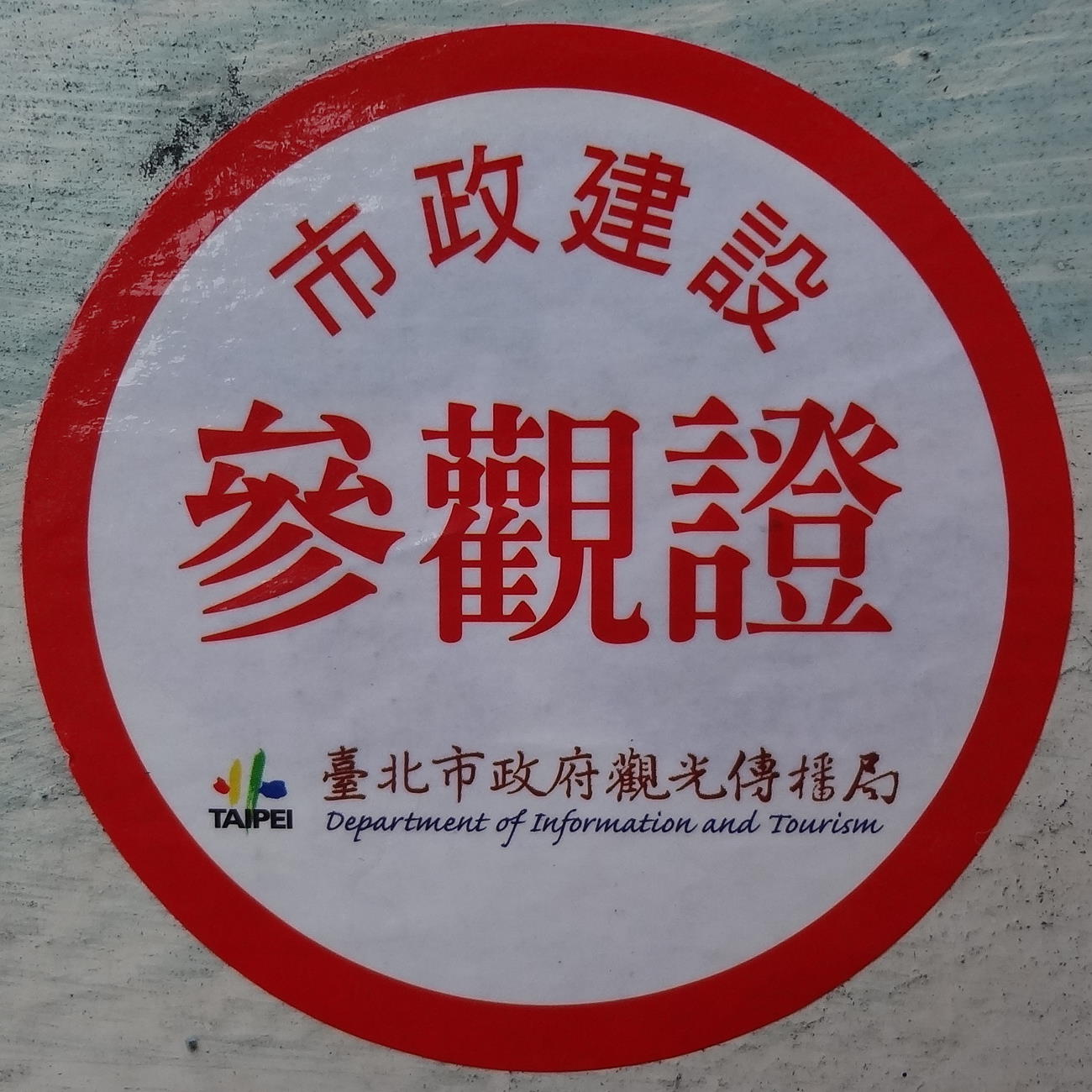 2013年臺北市政府觀光傳播局市政建設參觀證，為圓形塑膠貼紙。